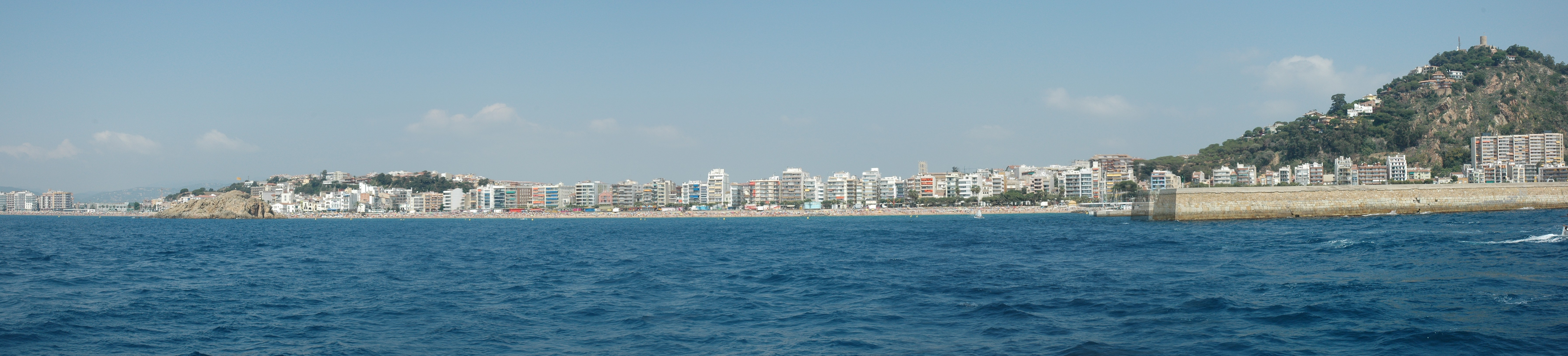 Blanes, Girona, Catalunya